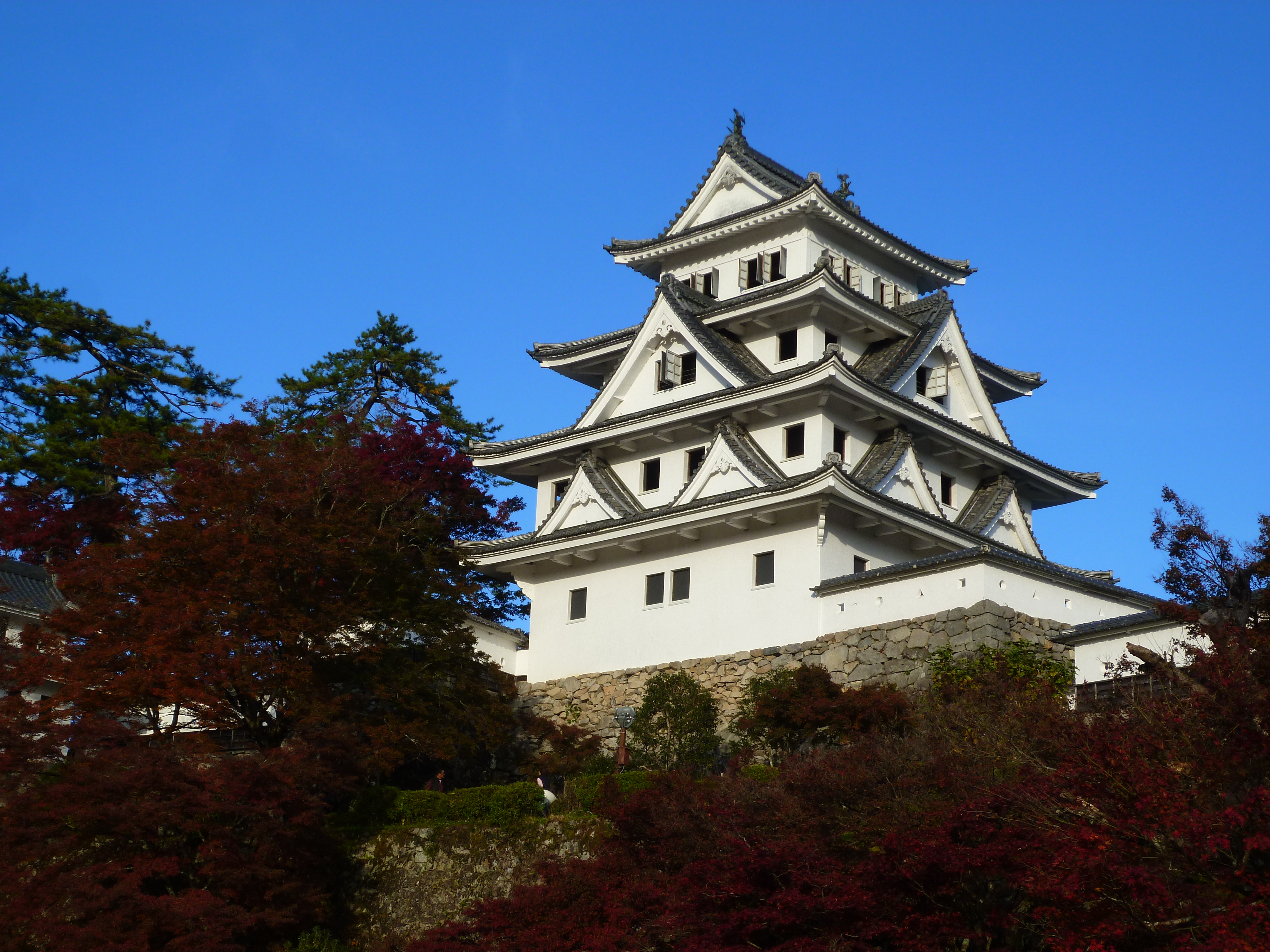 2017年秋季に撮影。